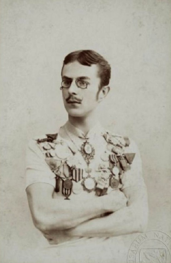 Rössler-Ořovský Josef, český sportovec